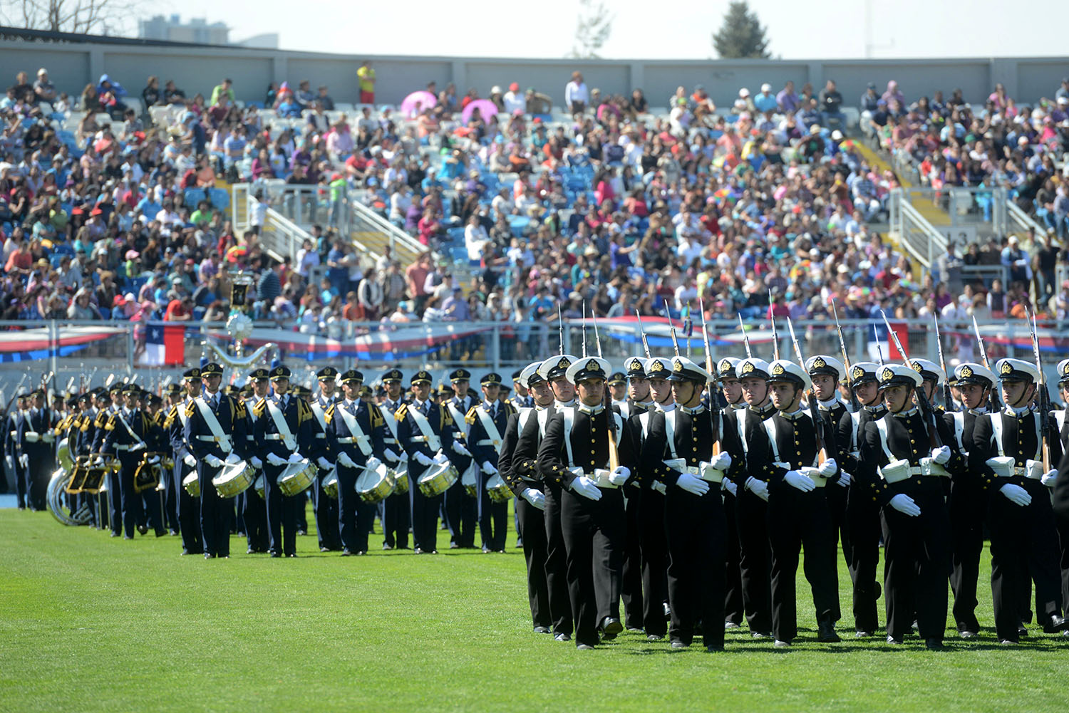 Ministro Elizalde participa de la celebración del Bicentenario de la Batalla de Rancagua